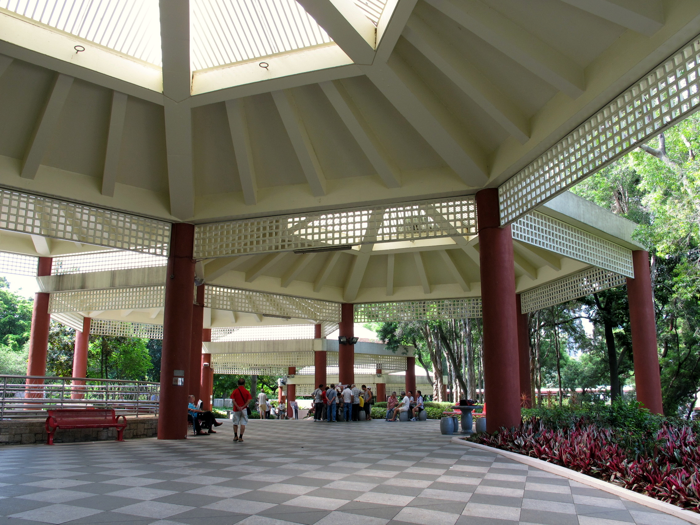 Tuen Mun Park Pavilion